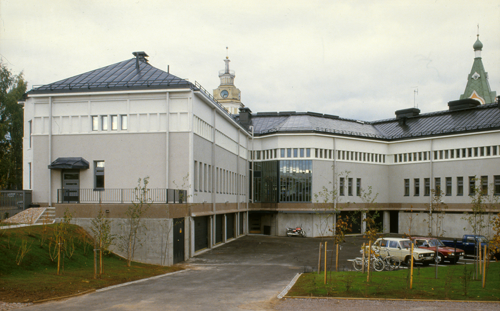 Haminan poliisi- ja oikeustalo. Hamina, Finland